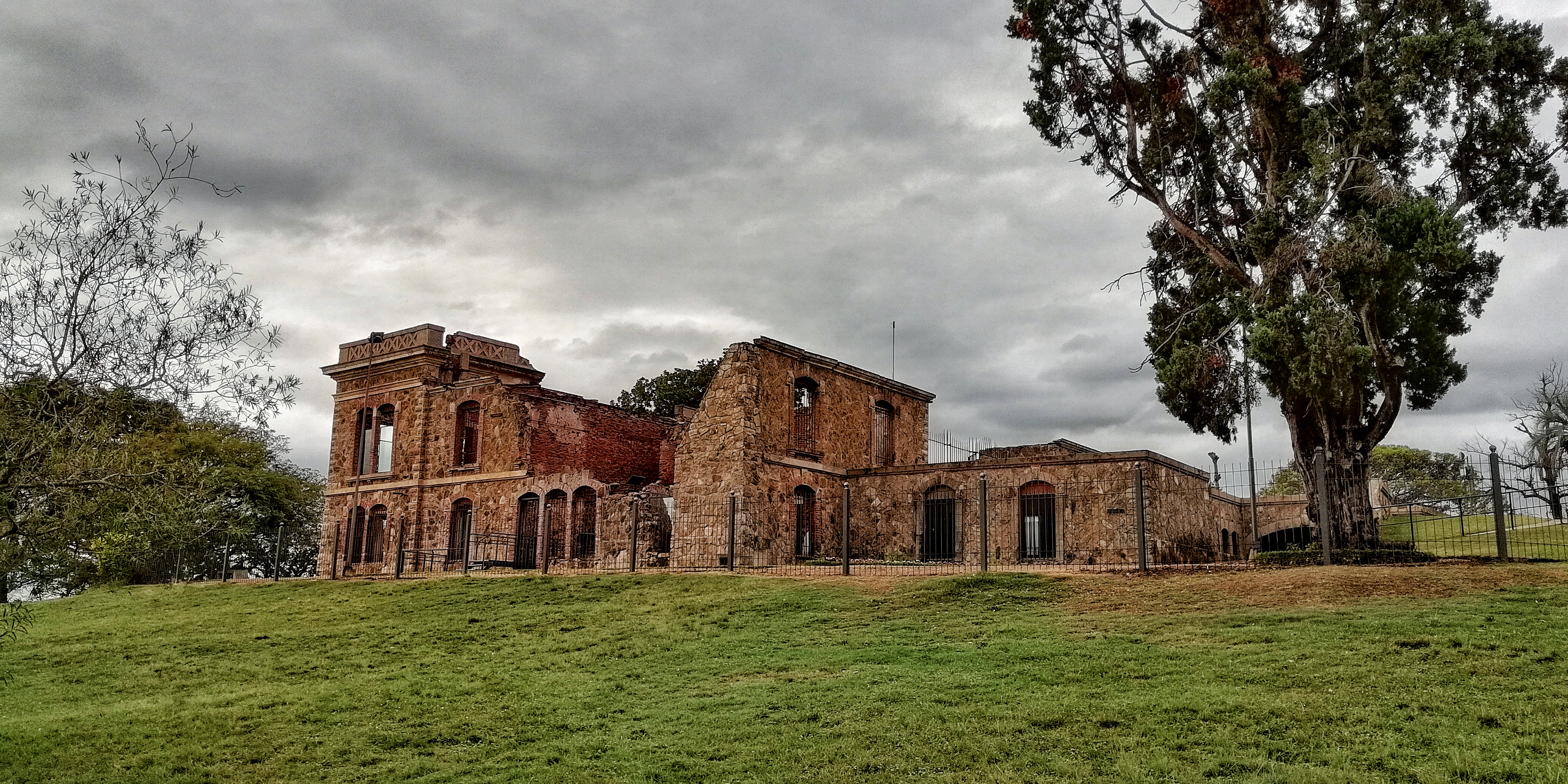 Castillo de San Carlos (Concordia, Argentina). Data del Siglo XIX, En 1938 un incendio lo destruye y cae en el abandono. Actualmente fue puesto en valor y cuenta con un Centro de Interpretación.